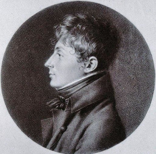 Jean Decker, peintre et dessinateur, né à Colmar en 1783, élève de Casimir Karpff, Buste, profil à g. Bibliothèque nationale et universitaire de Strasbourg